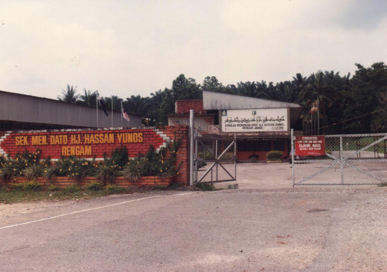 Pagar Lama Sekolah